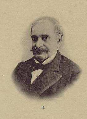 Demetrio de los Ríos: arquitectos restauradores de la Catedral de León